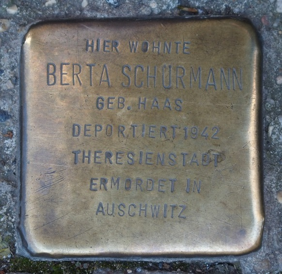 Stolperstein in Soest Jakobistraße 64, Berta Schürmann